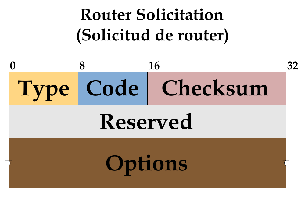 Formato de mensaje ICMPv6 Router Solicitation